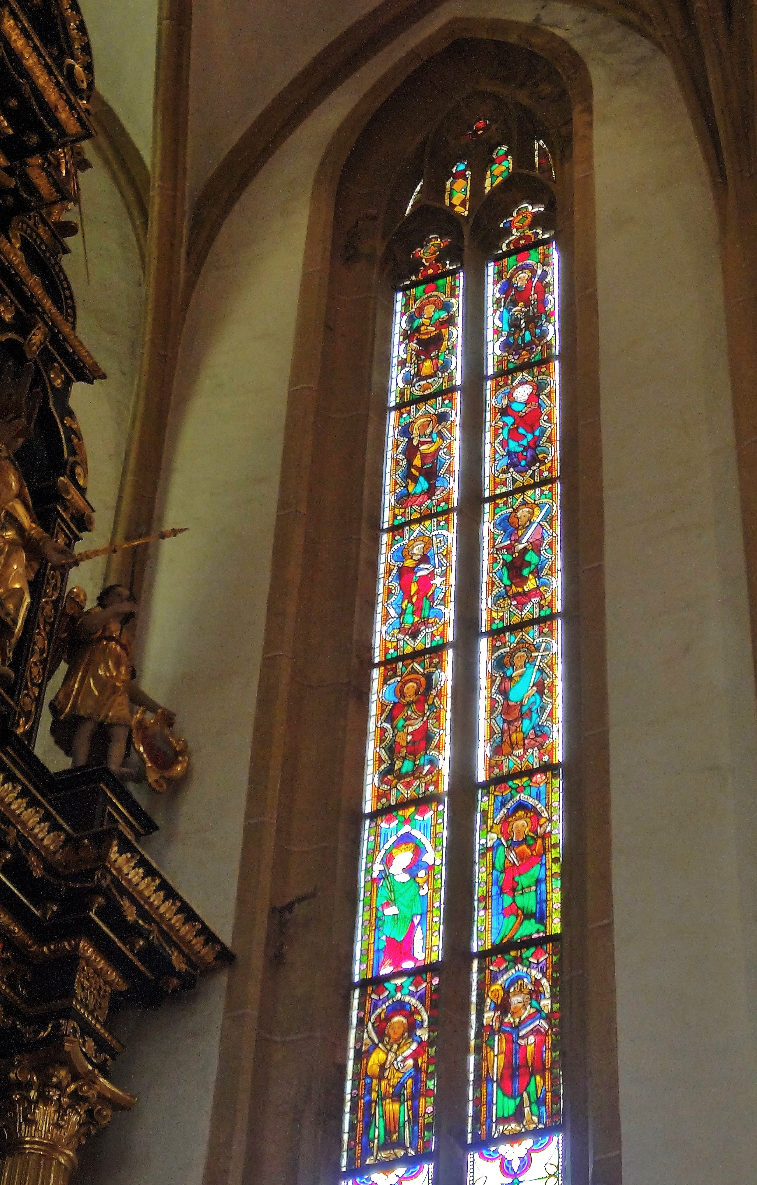 Kath. Pfarrkirche St. Leonhard im Lavanttal, Fenster im Chor